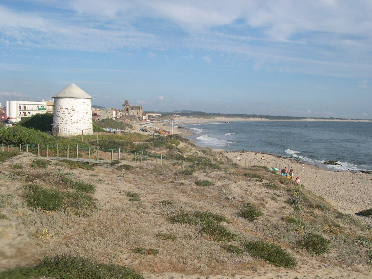 Praia da Apúlia, Portugal